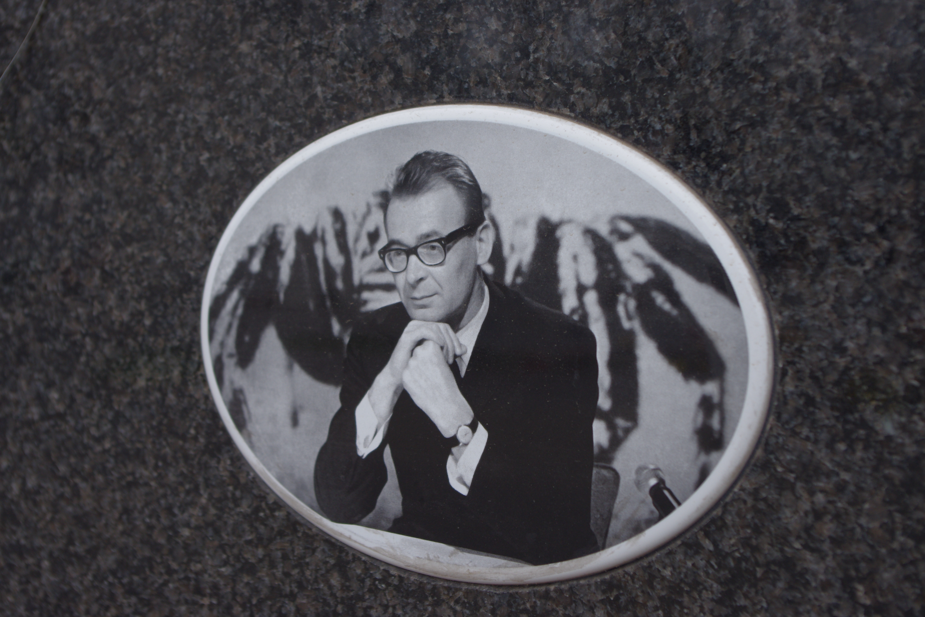 Grób dziennikarza Jerzego Wunderlicha (1930-2009) na Cmentarzu Komunalnym Północnym w Warszawie